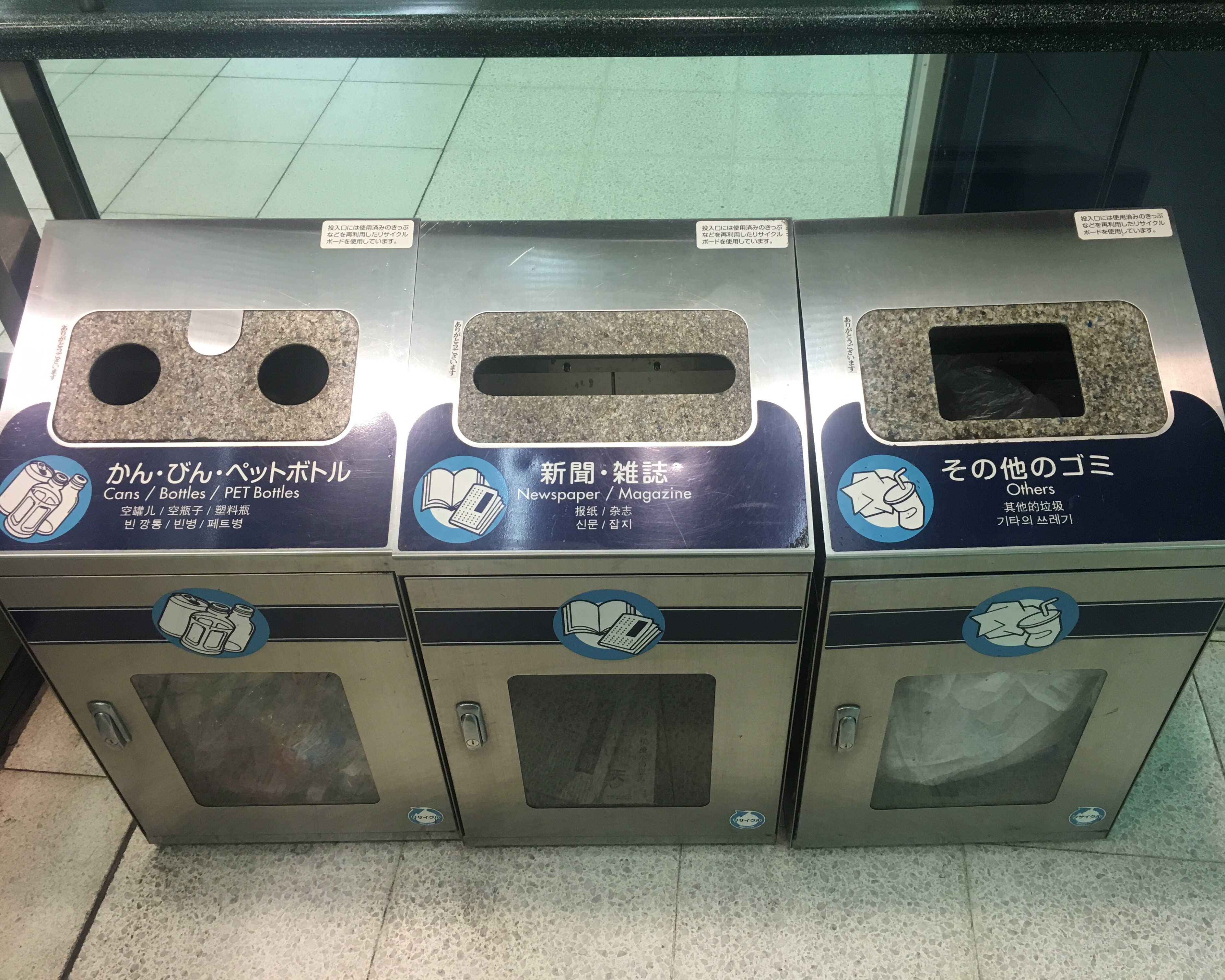 ゴミ箱の投入口の形状。2018年9月17日、東京メトロ四ツ谷駅にて。